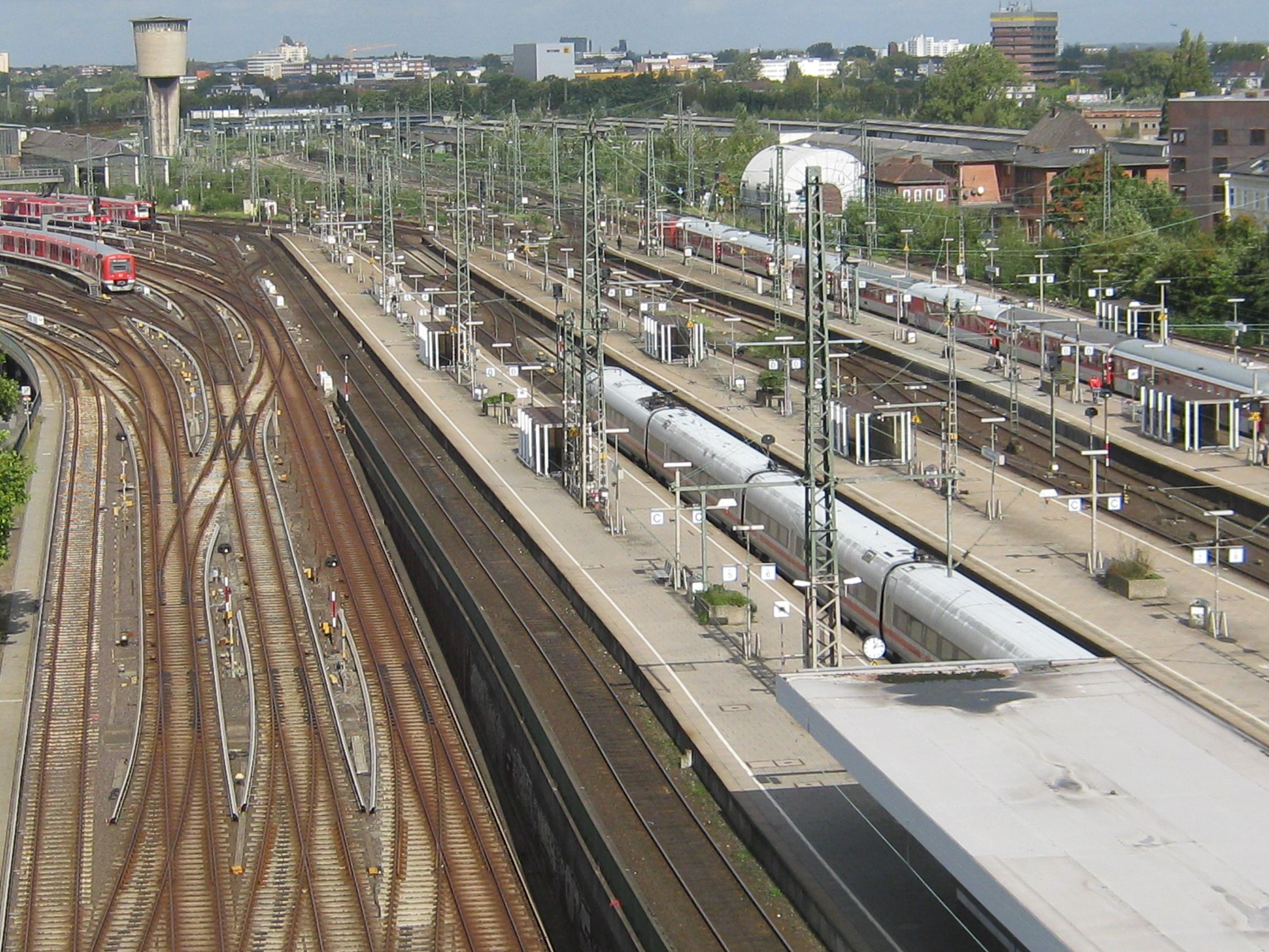 Aufnahme der Gleise zum Bahnhof Hamburg-Altona, aufgenommen vom Deck des Parkhauses